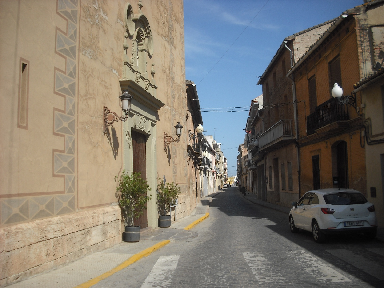 Carrer Major de Bonrepòs.